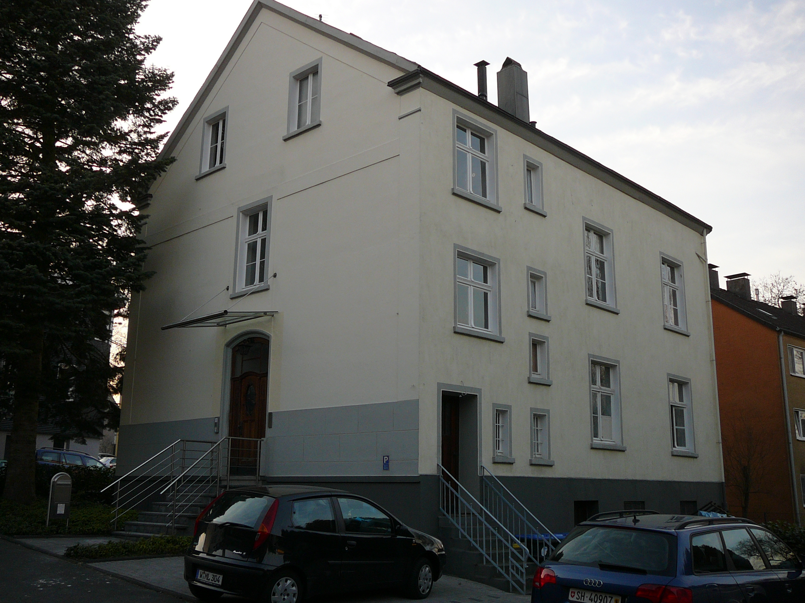 Villa Beckmannshagen, Beyeröhde, Wuppertal